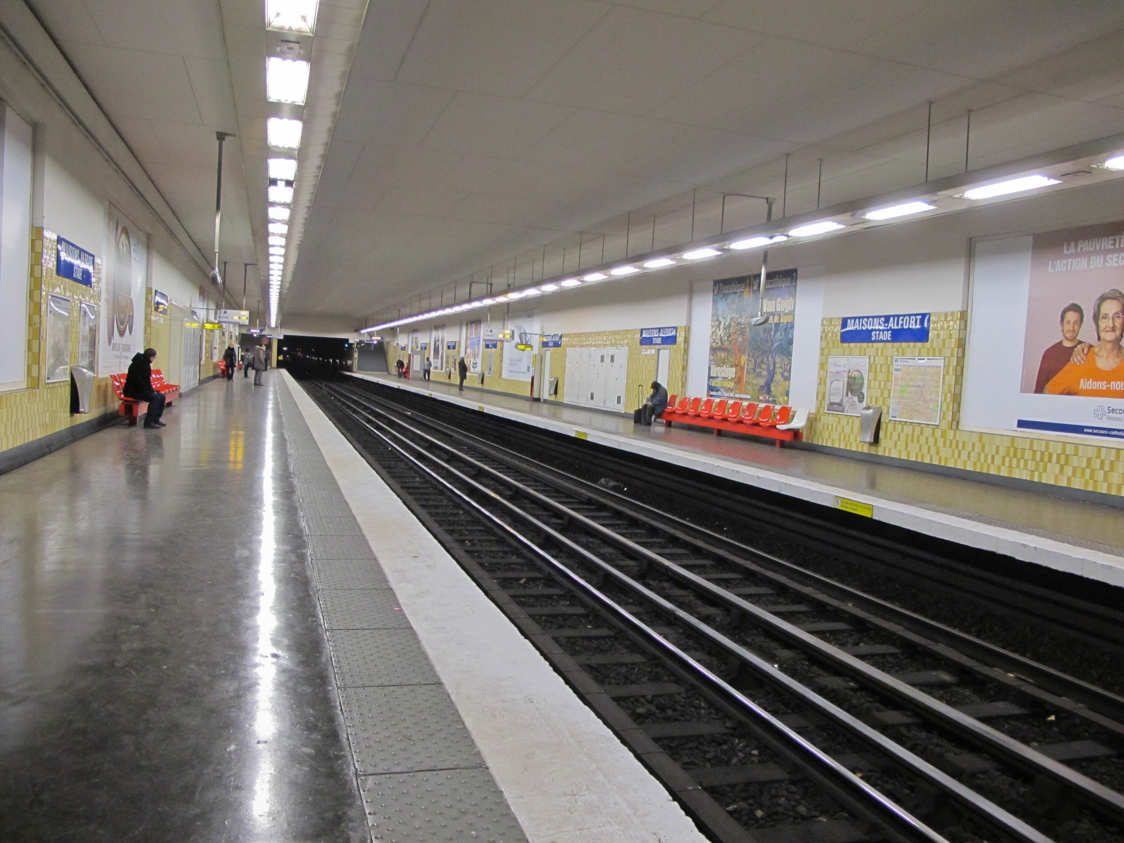 Station Maisons-Alfort - Stade. Ligne 8 du métro de Paris - Paris, France